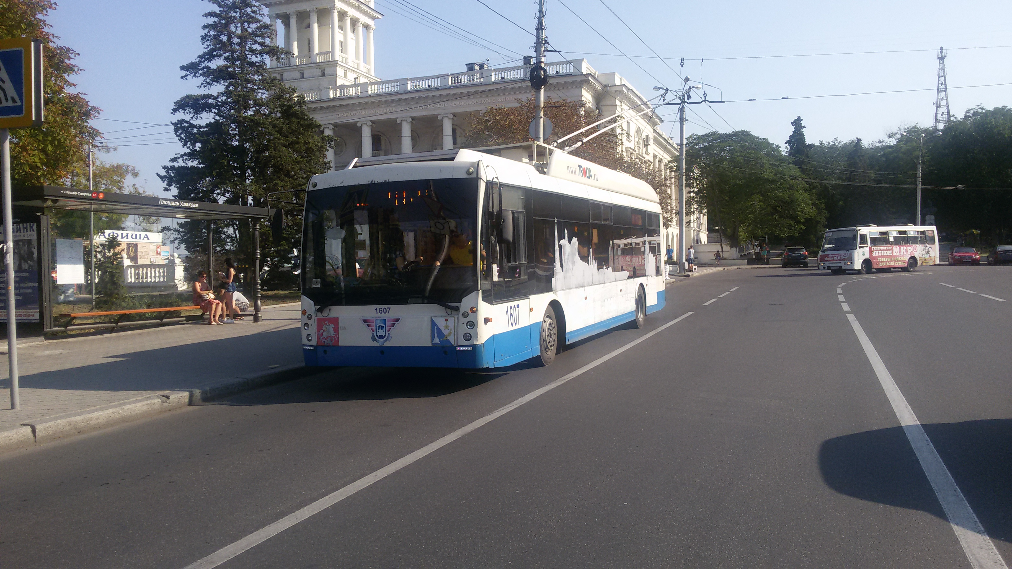 Севастопольскок троллейбус